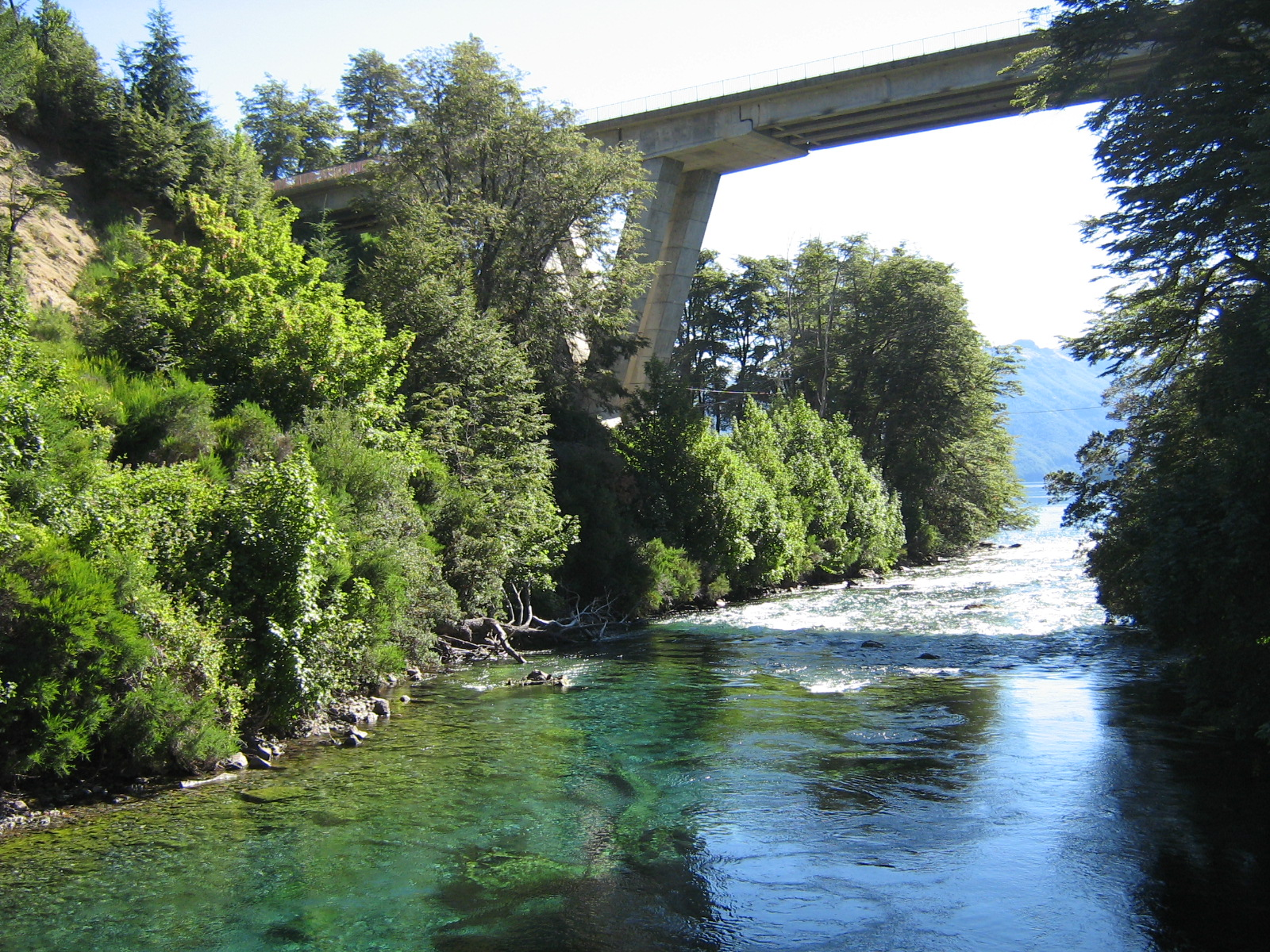 Imagen del río Correntoso, en la cual se puede ver el puente de la ruta 231, y la desembocadura en el lago Nahuel Huapi.